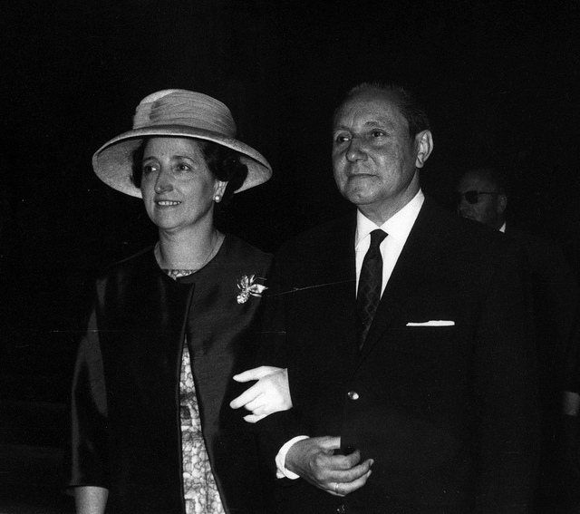 El matrimonio Alvira Domínguez, asistiendo a una boda en Salamanca (España).